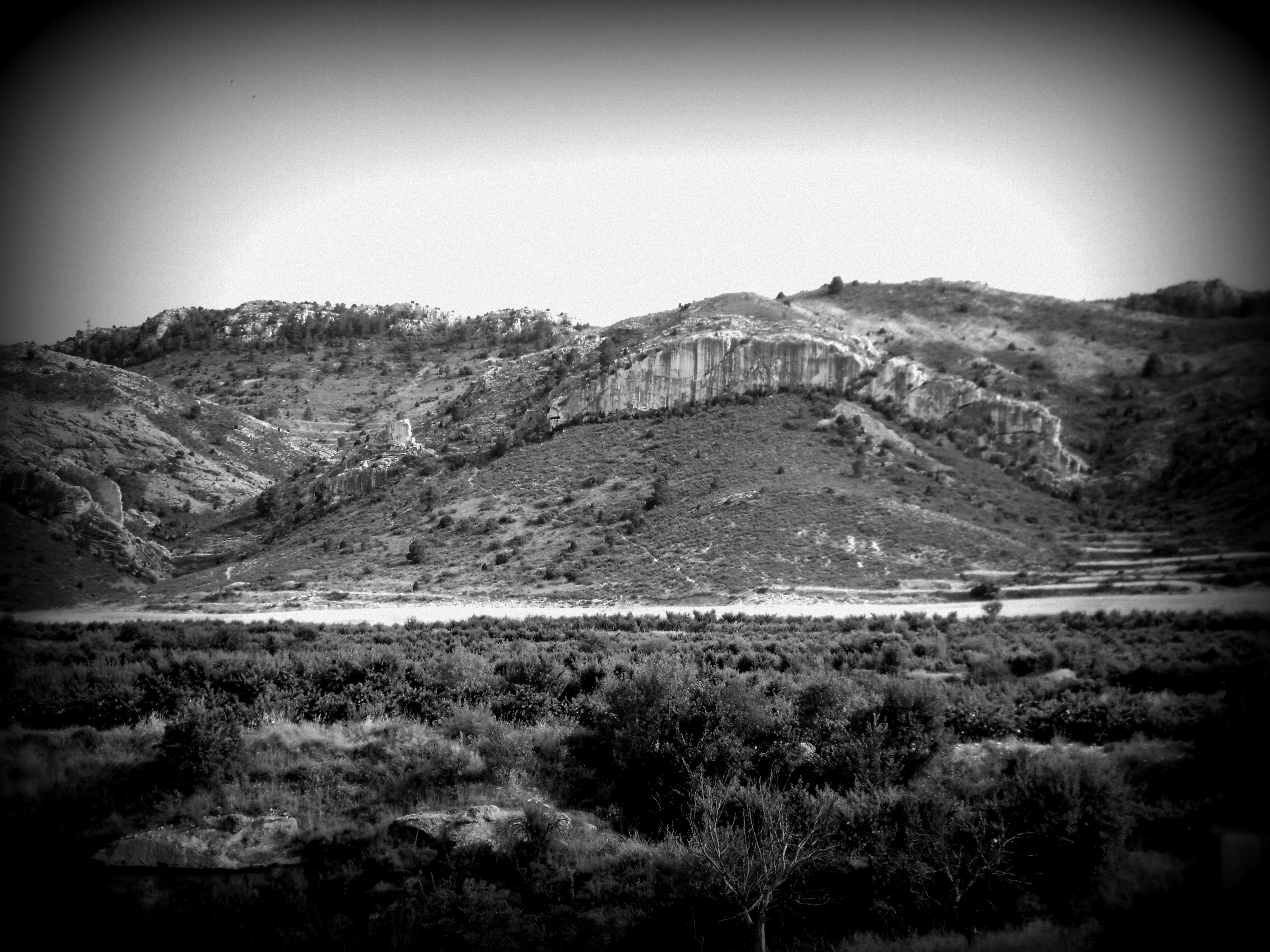 Vista parcial de La Clocha, Calanda (Teruel)